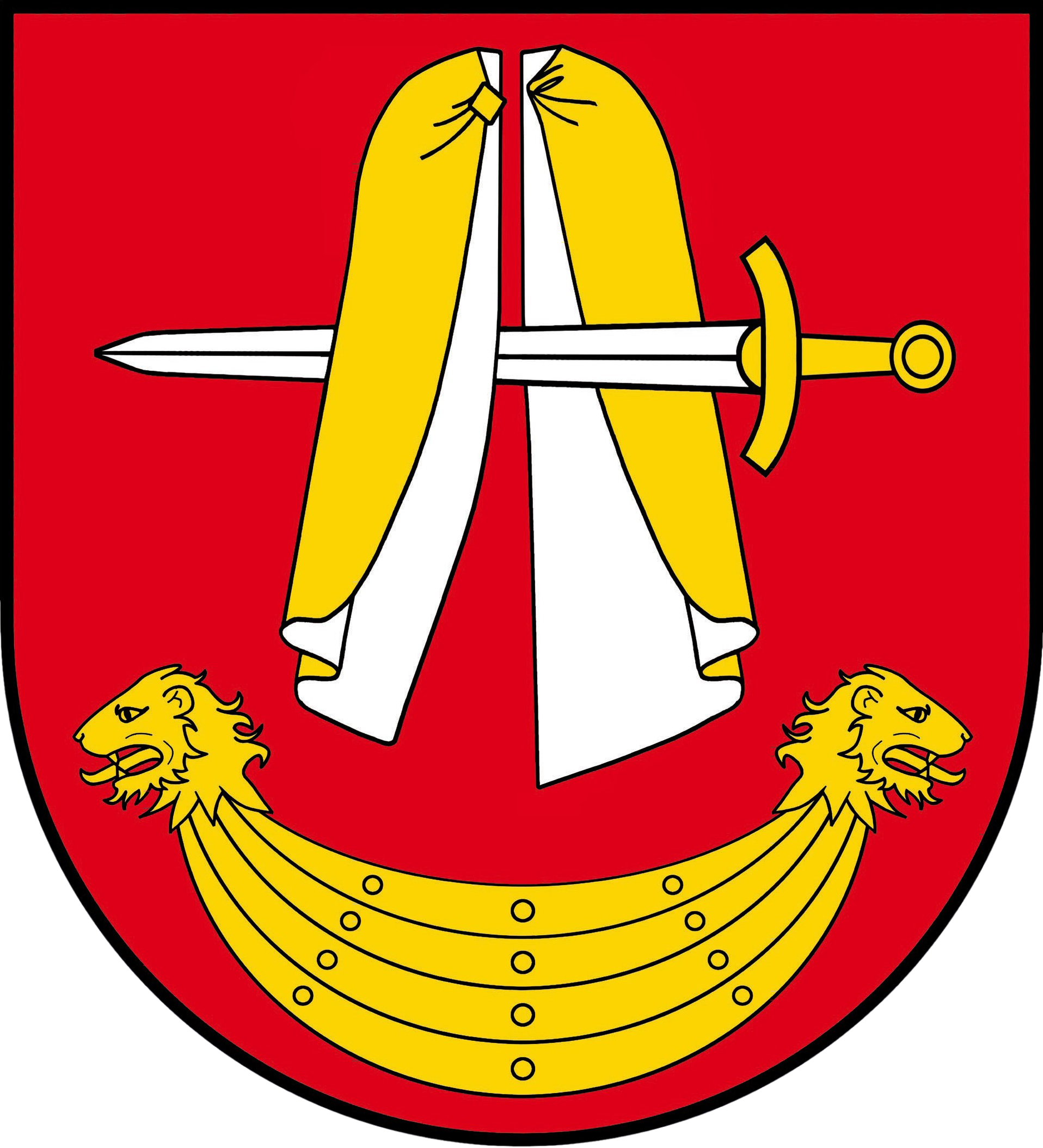 Herb gminy Poświętne w powiecie białostockim